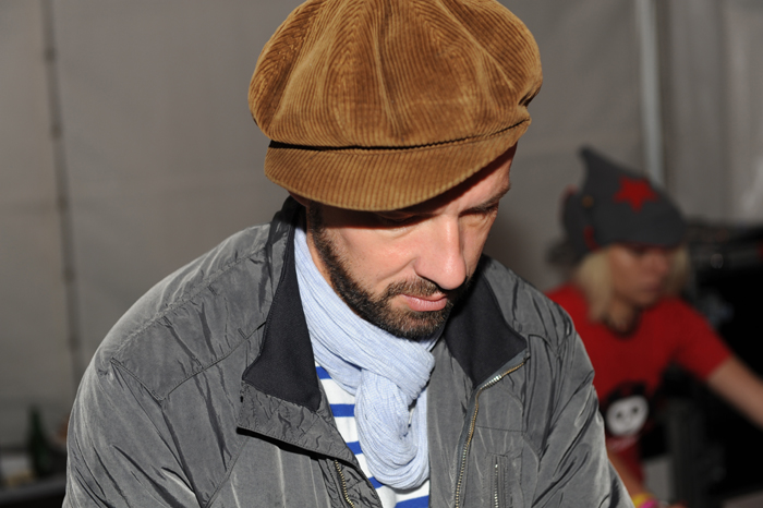 DJ Shantel.